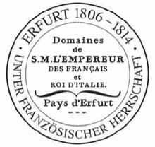 Die Ansicht der Stadt Erfurt nach der Medaille des Weimarer Medailleurs Friedrich Wilhelm Facius (1764–1843) aus dem Jahre 1808. Die „dankbare Stadt” hatte am 14. Oktober 1808, dem Tag der Abreise des französischen Kaisers Napoleon und des russischen Kaisers Alexander vom Fürstenkongress in Erfurt, die Medaille Napoleon I. prägen lassen. Das hier angegebene Datum 1808 ist offensichtlich falsch. Es war 1808 nicht bekannt, dass die französische Herrschaft 1814 enden würde.